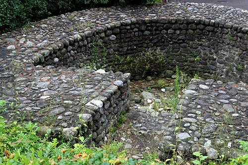 Grundmauern des südl. Eckturms des Römerkastells ARBOR FELIX